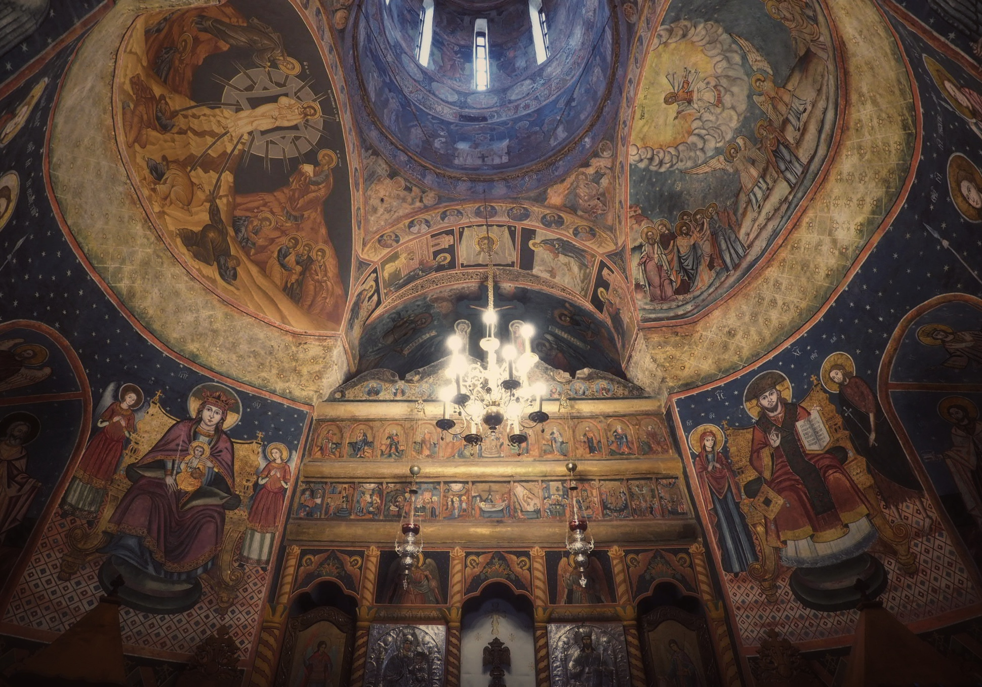 Sinaia, Romania